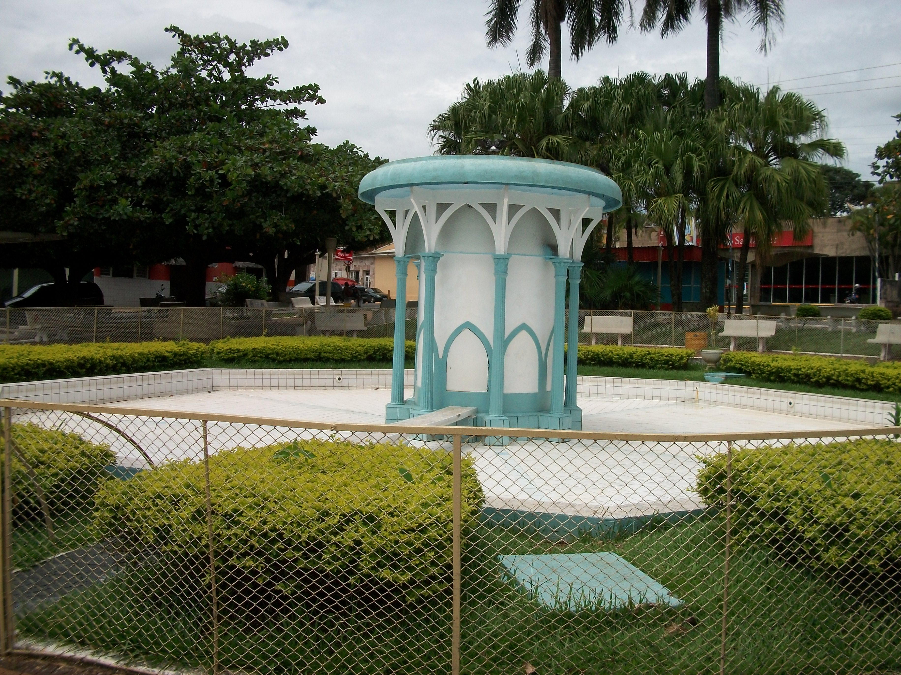 Fonte luminosa localizada na Praça da República, no centro da cidade de São Simão, interioir paulista; fevereiro de 2010.